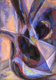 Hamza D. Ákos Ars Poetica című festménye